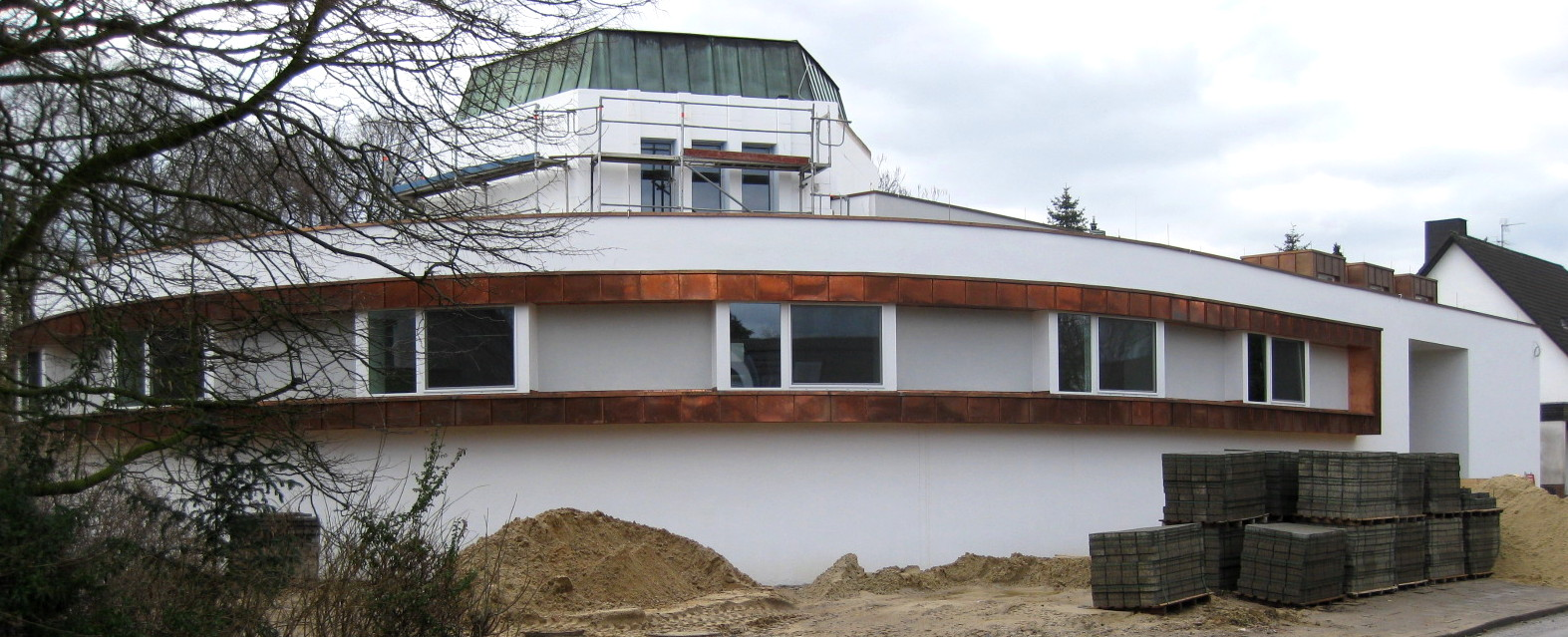 Die Synagoge (Osnabrück) von 1967/1969 von Hermann Zvi Guttmann mit dem Erweiterungsbau von 2008/2010 von Alfred Jacoby